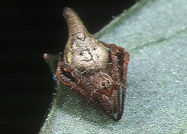 female Eriovixia pseudocentrodes from Okinawa.